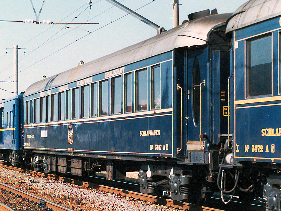 ORIENT EXPRESS '88 Schlafwagen No.3487 A